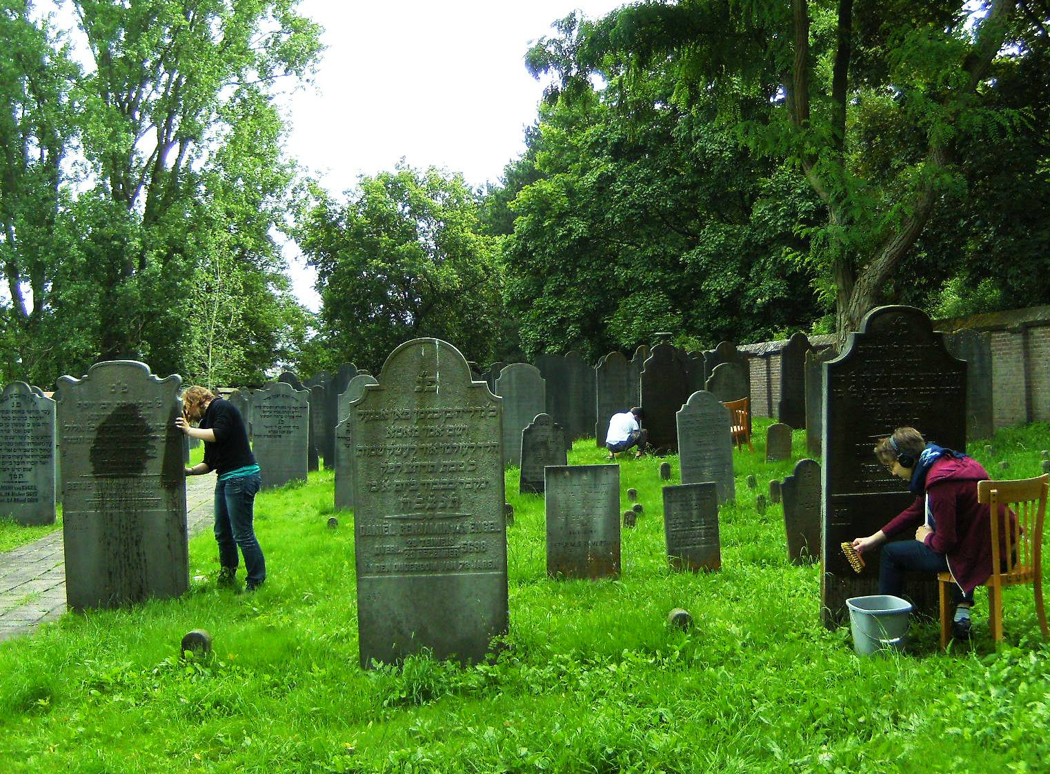 Juli 2012. Groep jongeren uit Oostenrijk, Ukraine en Duitsland maken graftekens op de joodse begraafplaats van Deventer beter leesbaar tijdens een werkweek met als thema discriminatie en verzoening.